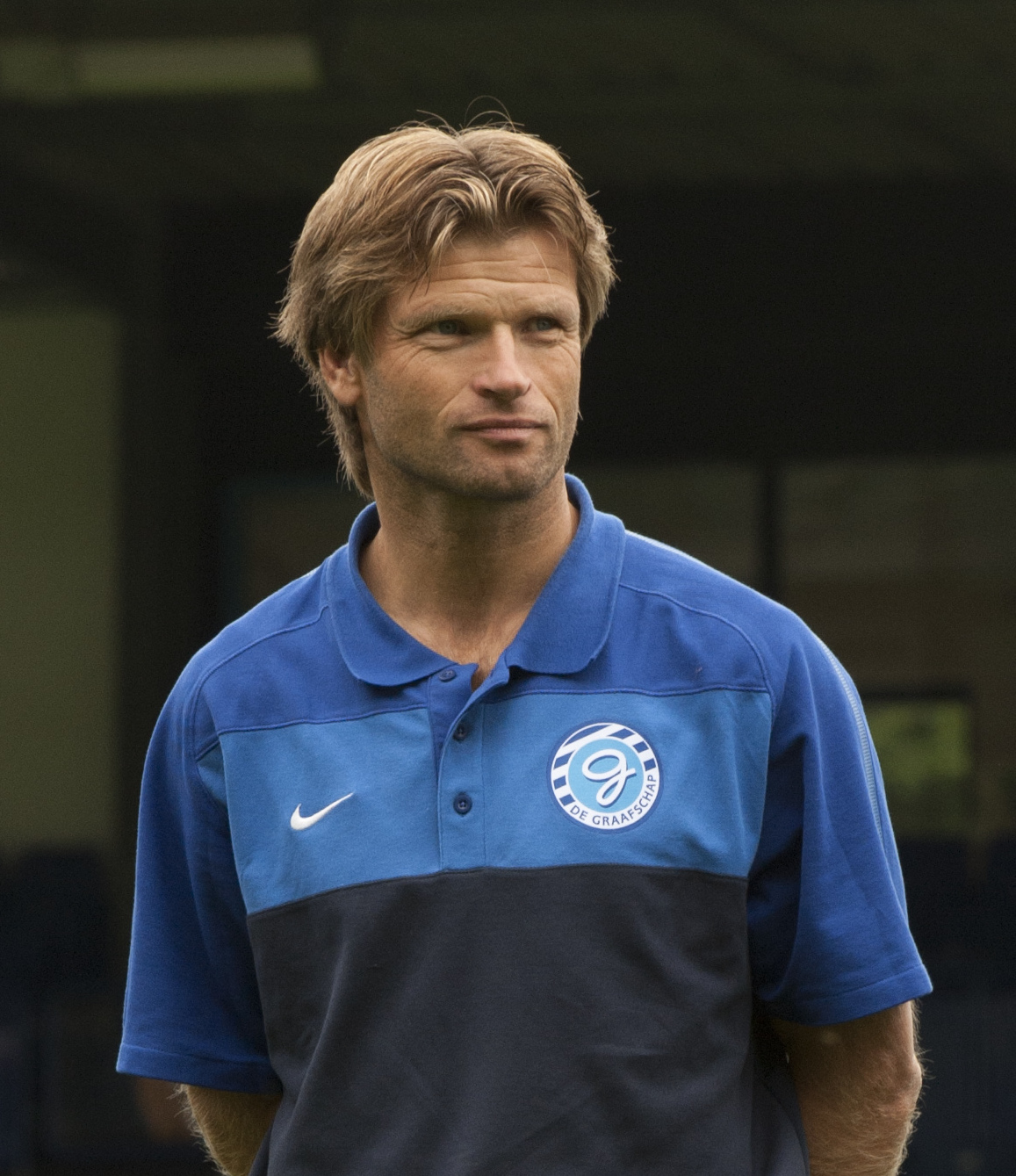 Jan Vreman als trainer van De Graafschap